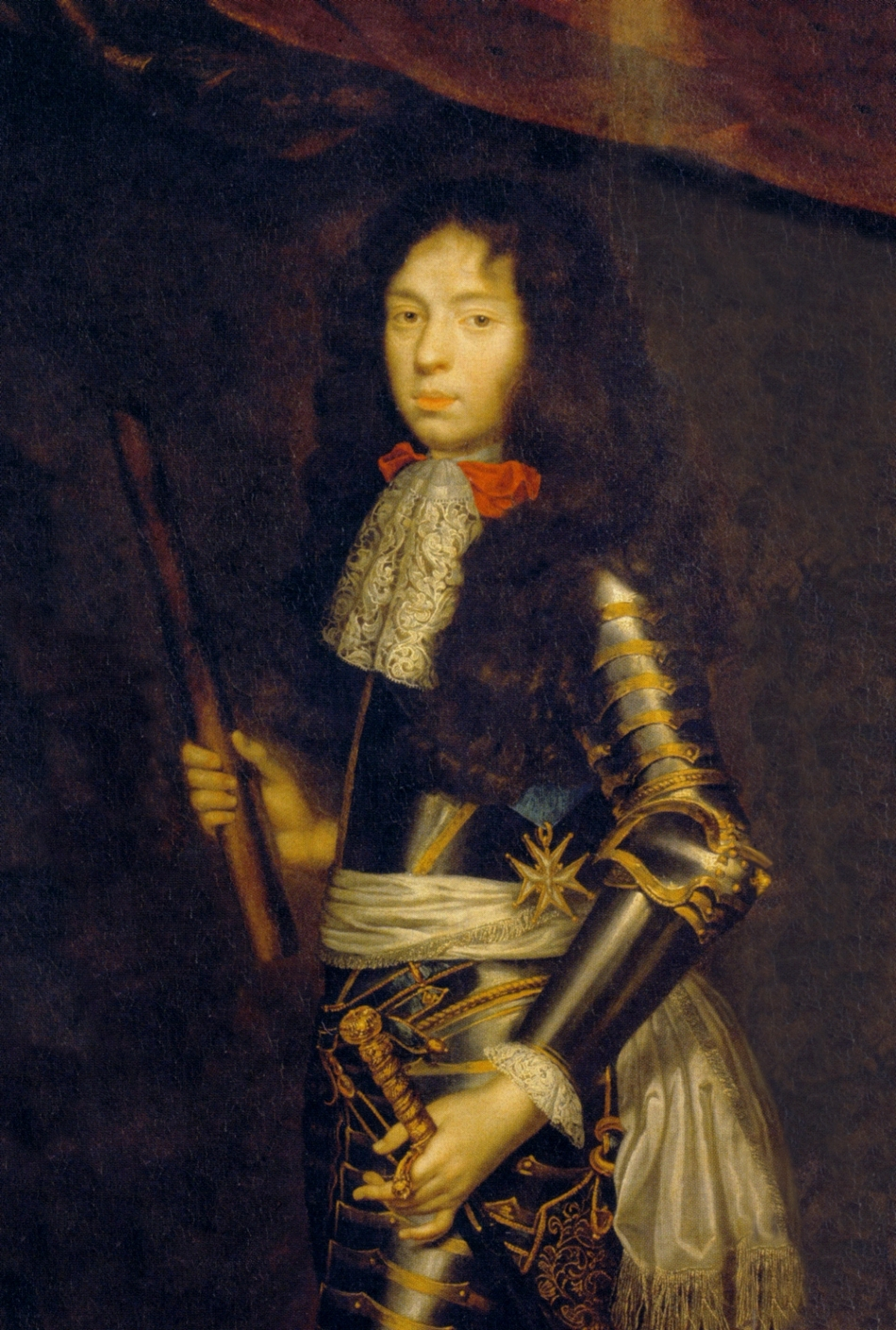 Henri Jules de Bourbon, cinquième prince de Condé, jeune homme